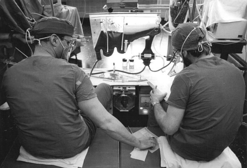 Bad Berka, Herzklinik, Operation Zum Beitrag: "Wie ein neues Leben" - Zehn Jahre Herzklinik Bad Berka ADN-ZB Hirndorf - 7.5.1985 - OA Dr. Jürgen Schmidt (links) und Fachpfleger für Anästhesie Gerd Weber arbeiten während einer Herzoperation an der Zentralklinik für Herz- und Lungenkrankheiten Bad Berka konzentriert an der Herz-Lungen-Maschine. (Hierzu gehören die Fotos 1986-0507-300N-304N!)